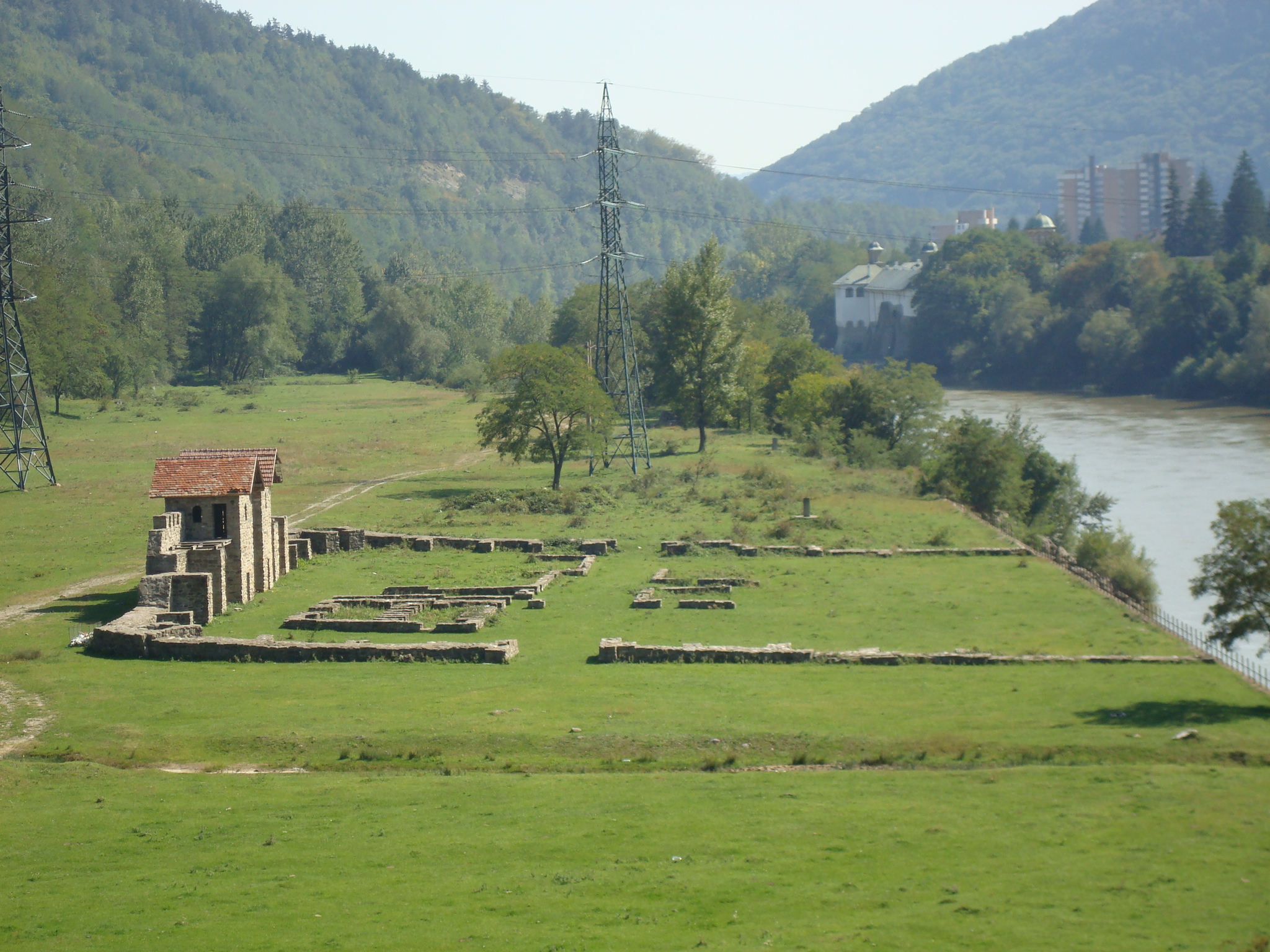 Castrul roman Arutela